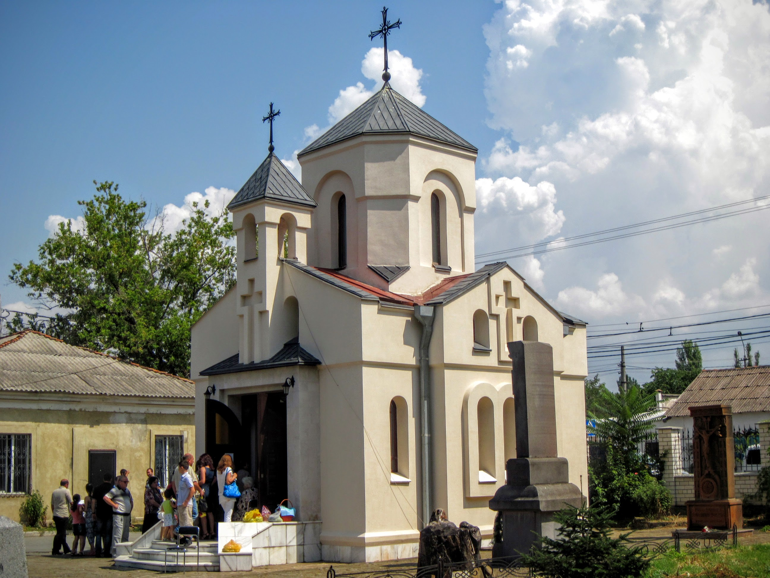 Армянское кладбищеXIX-XX вв.: улица Старозенитная/ улица Бахчисарайская, Симферополь, Крым This object is located on the Crimean Peninsula and recognized as cultural heritage by Russia under the monument ID: 8231197000. The legal status of the Crimean region is currently disputed.